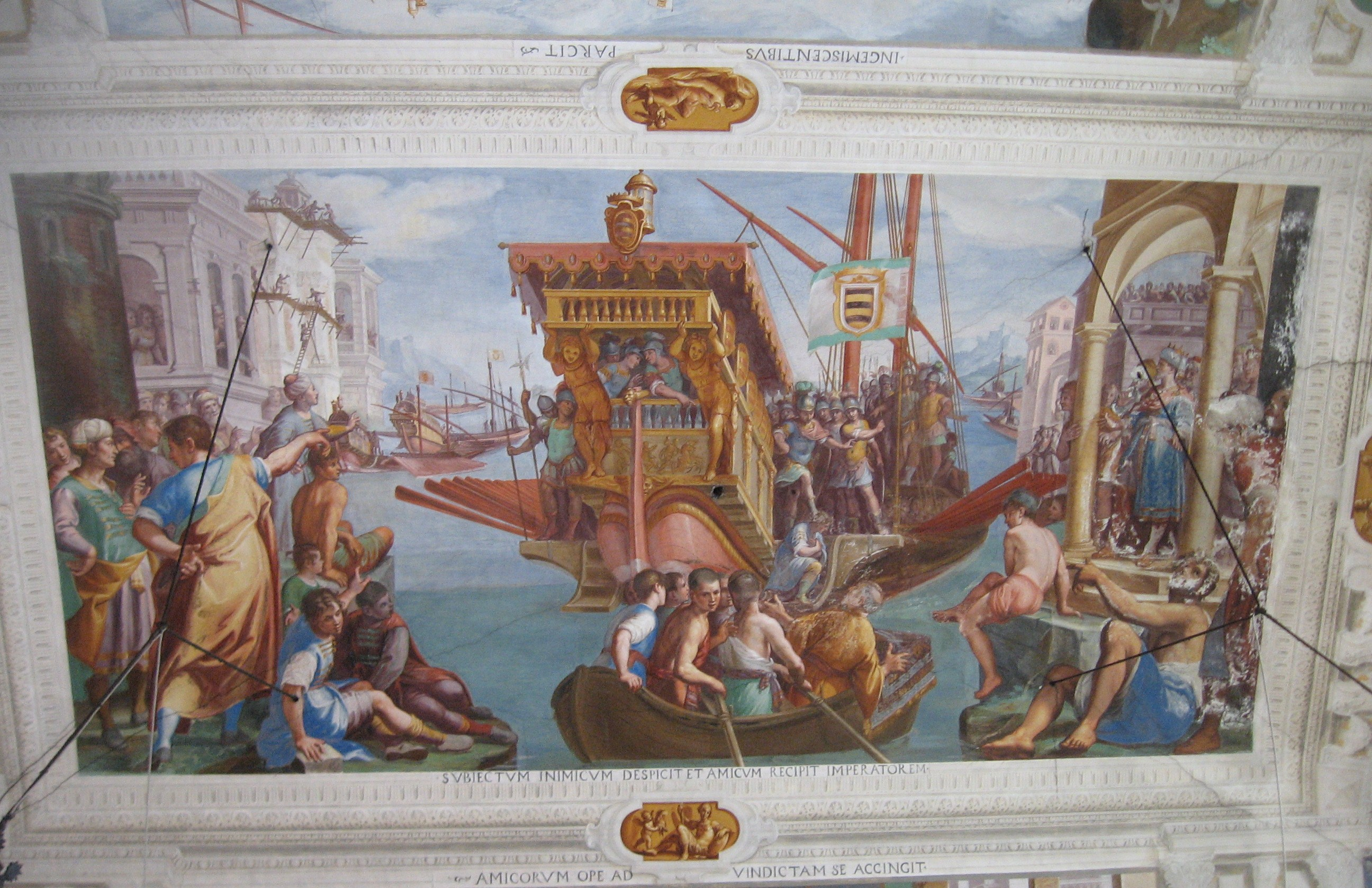 Affreschi presso la villa Spinola di San Pietro a Sanpierdarena Genova This is a photo of a monument which is part of cultural heritage of Italy.